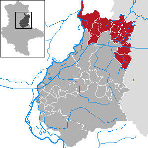 Verwaltungsgemeinschaft Elbe-Stremme-Fiener in Sachsen-Anhalt - Landkreis Jerichower Land